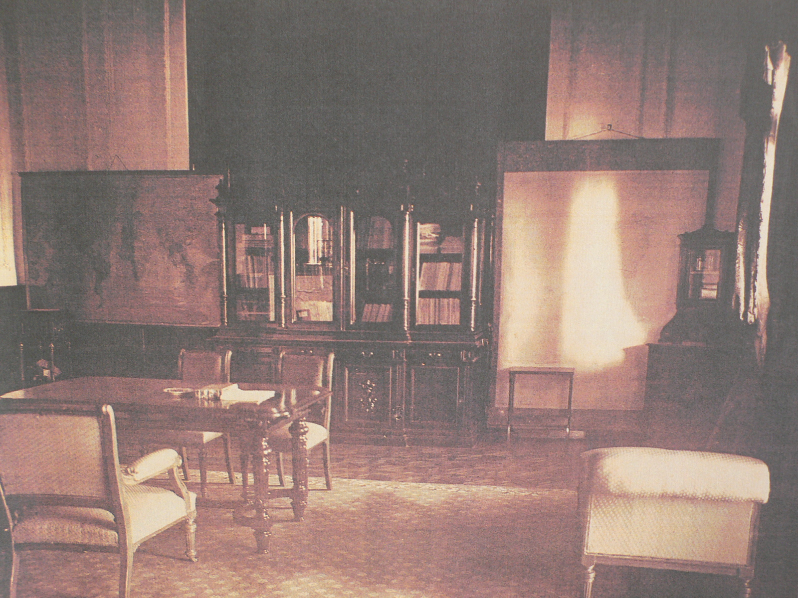 臺灣總督官邸二樓書房。